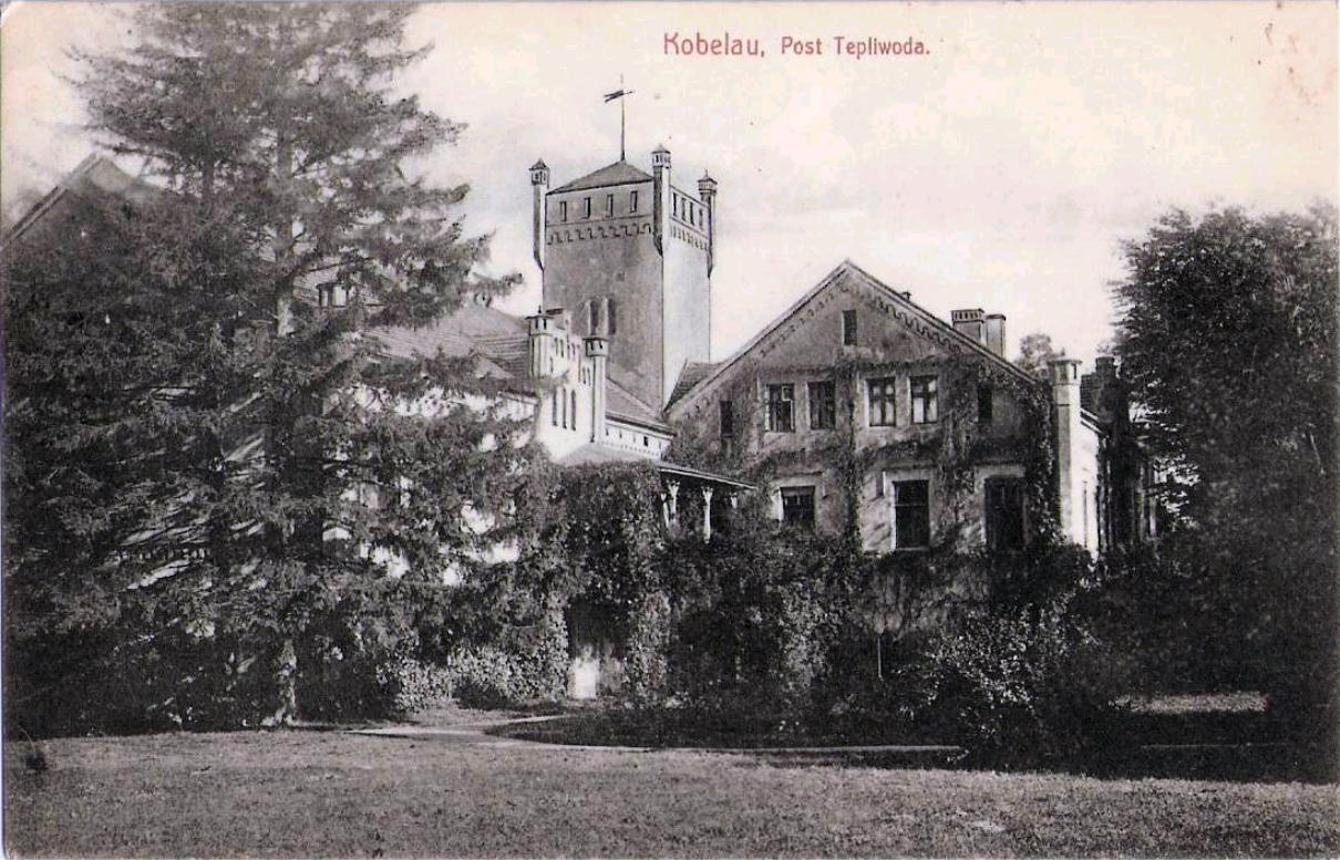 Château de Kobelau en basse-Silésie,pologne.Démoli en 1978.Il est en ruines en 2013.